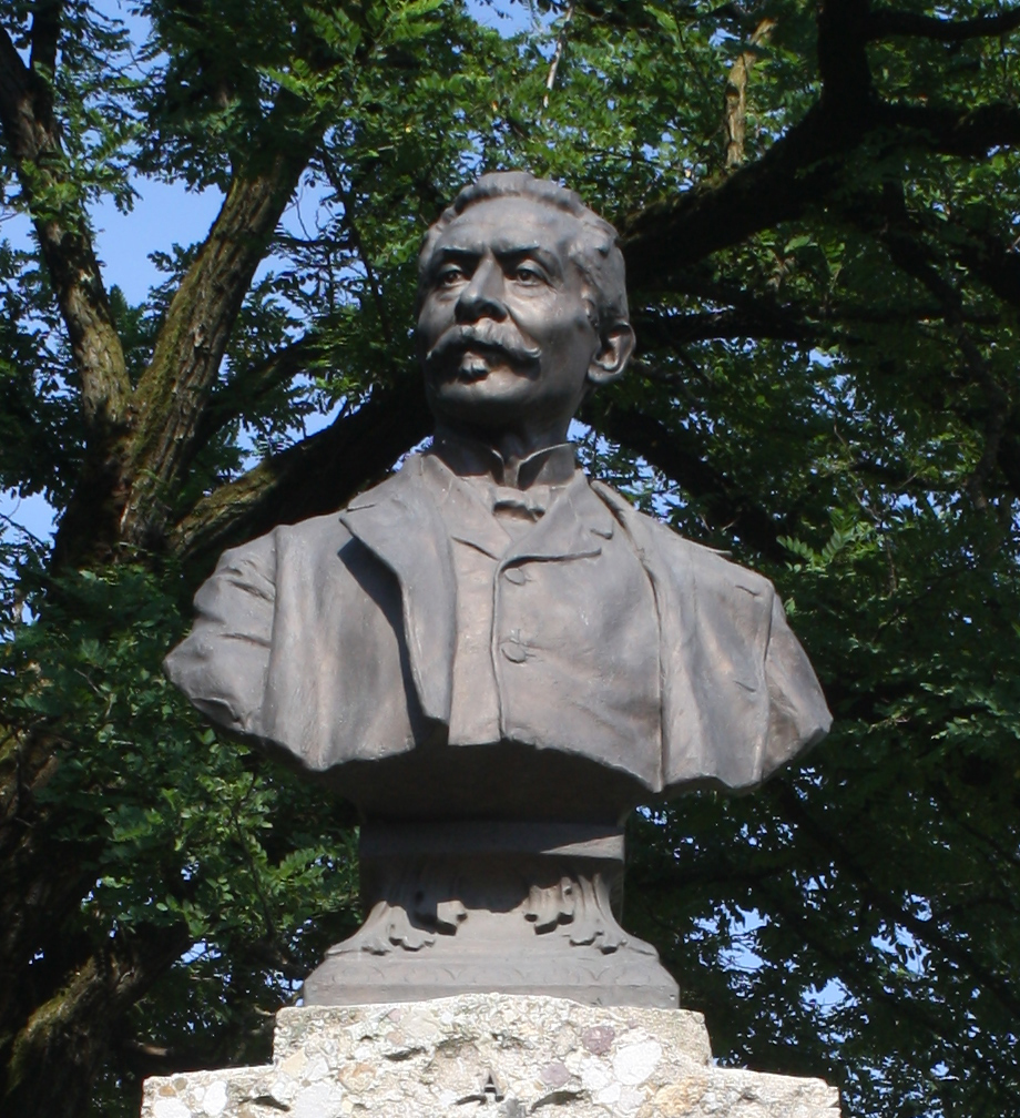 Busto raffigurante Cristoforo Benigno Crespi a Crespi d'Adda.